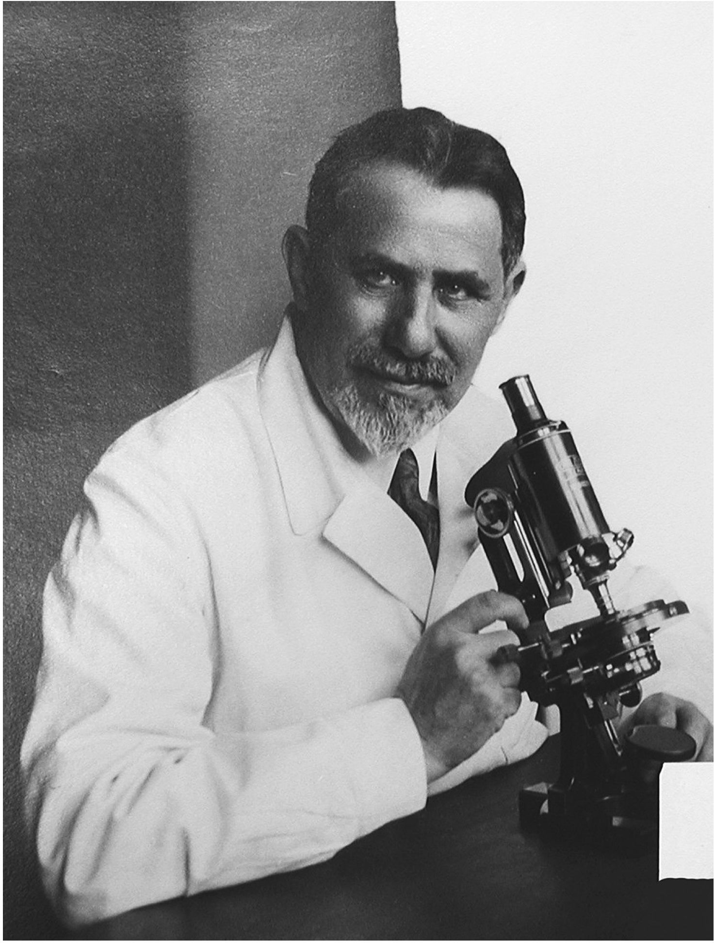 Photograph of Alfred Kohn about 1887